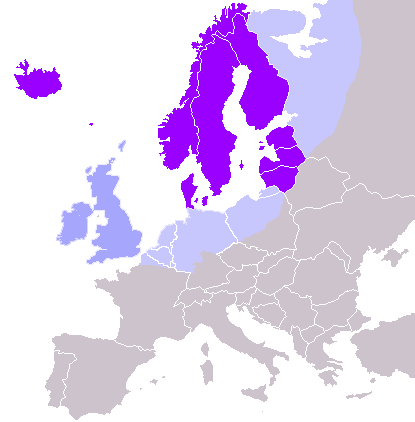 Europe du nord